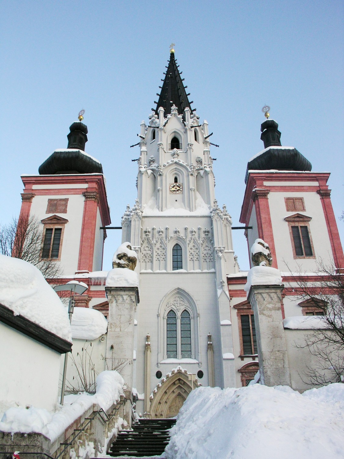 Description: Frontal view of Mariazell basilica, Styria - Frontalansicht der Basilika von Mariazell, Steiermark